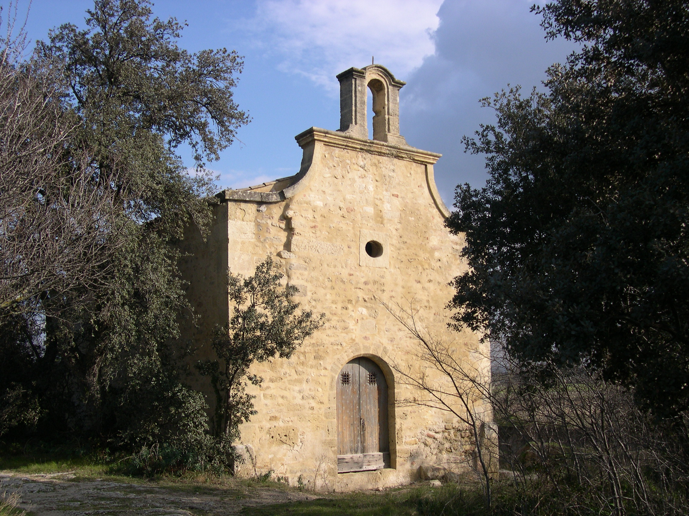 Chapelle Saint-Laurent à Pélissanne (Bouches-du-Rhône, France)